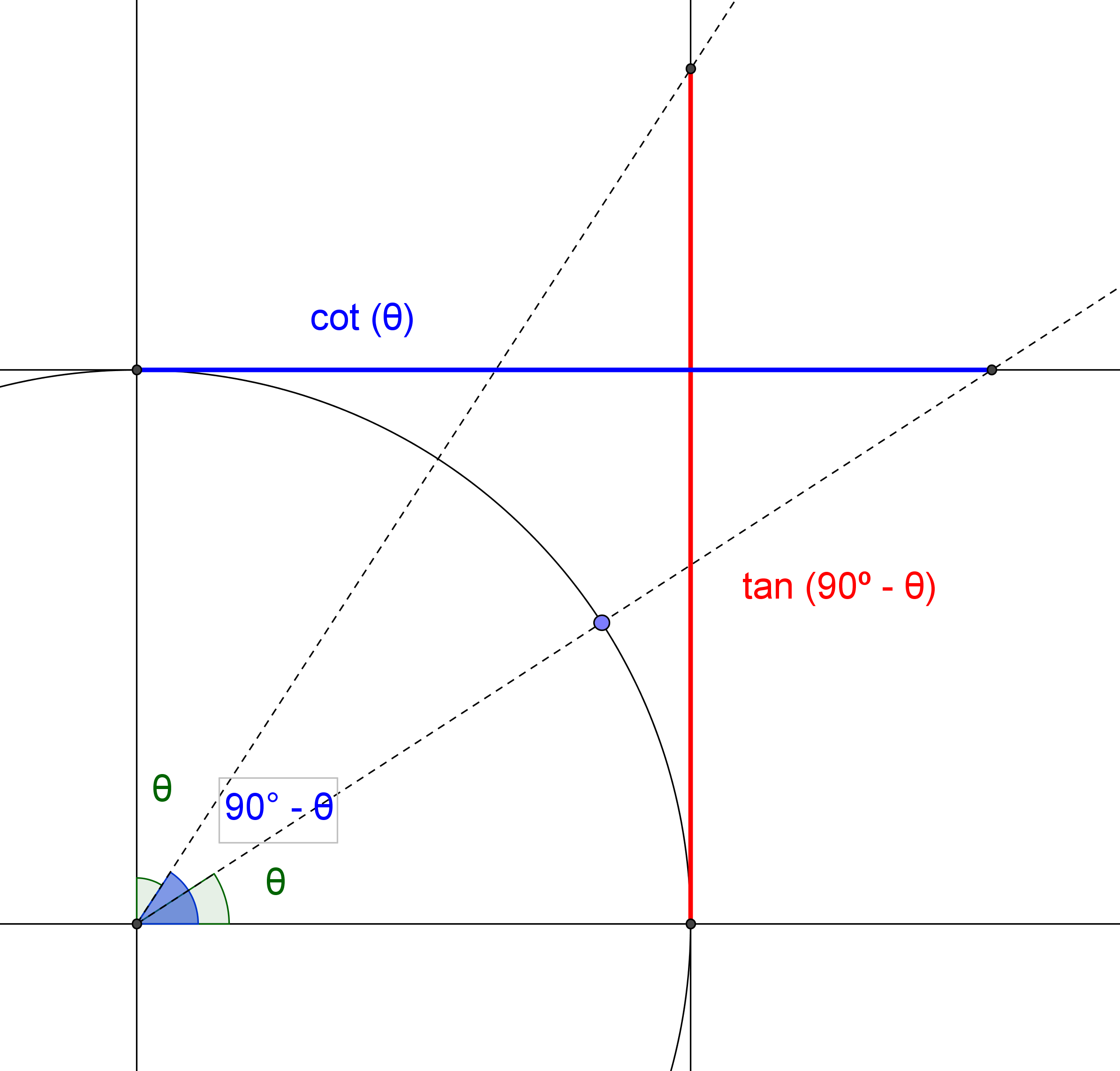 Descreve a relação de simetria entre cotangente de um angulo e seu complementar